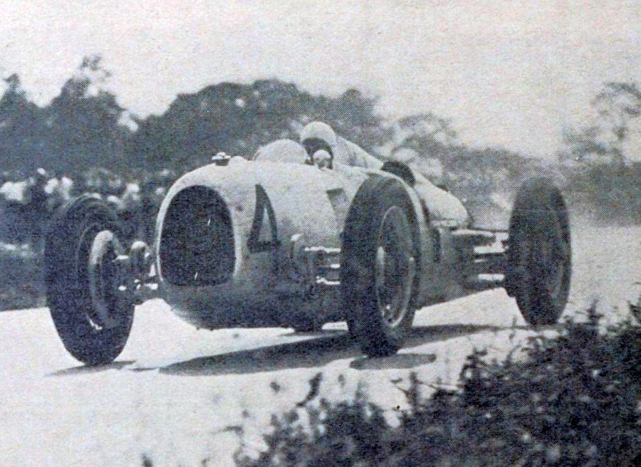 Hans Stuck au Grand Prix de l'ACF 1934 (Auto Union Type A).